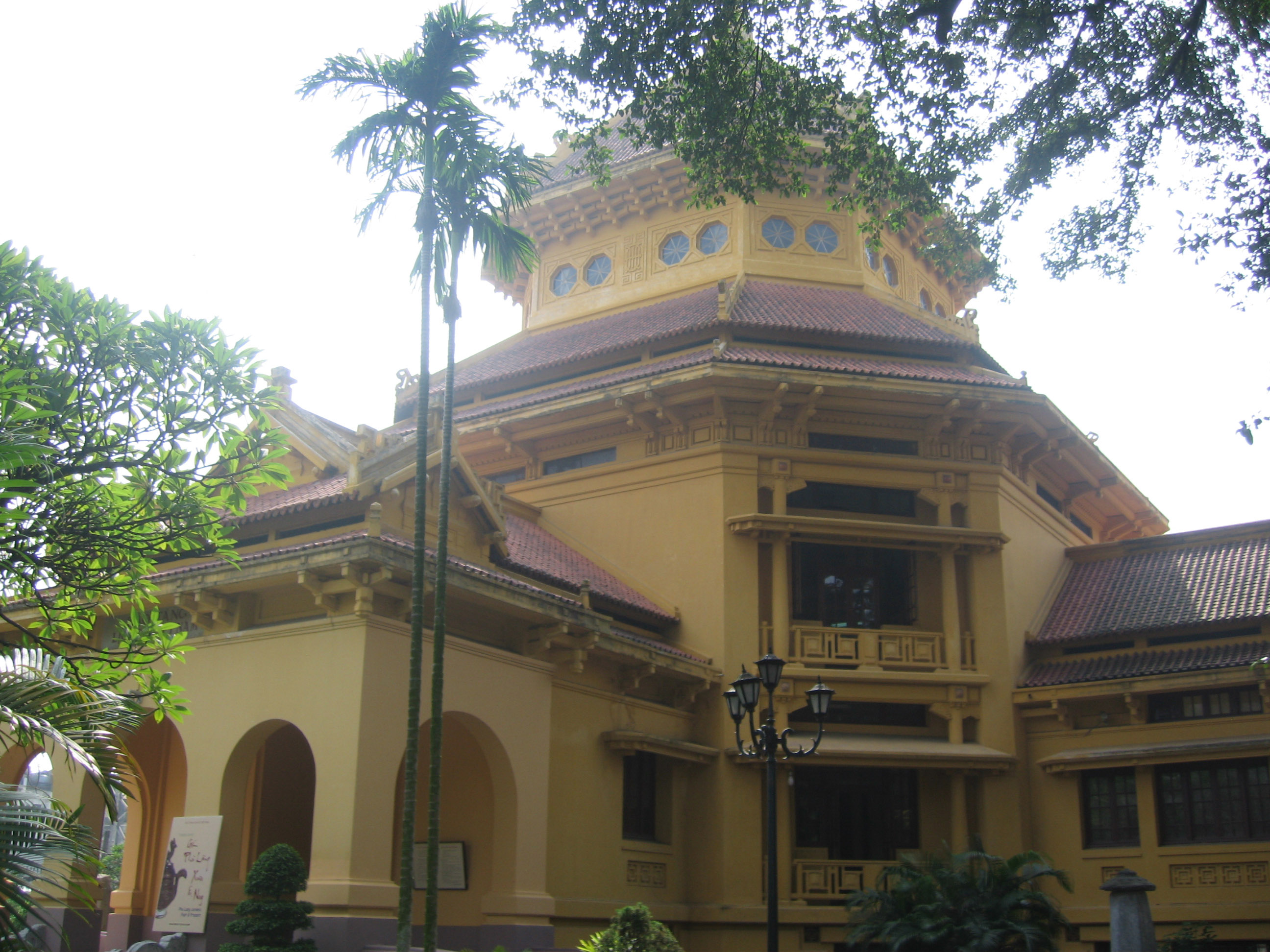 == Giấy phép ==